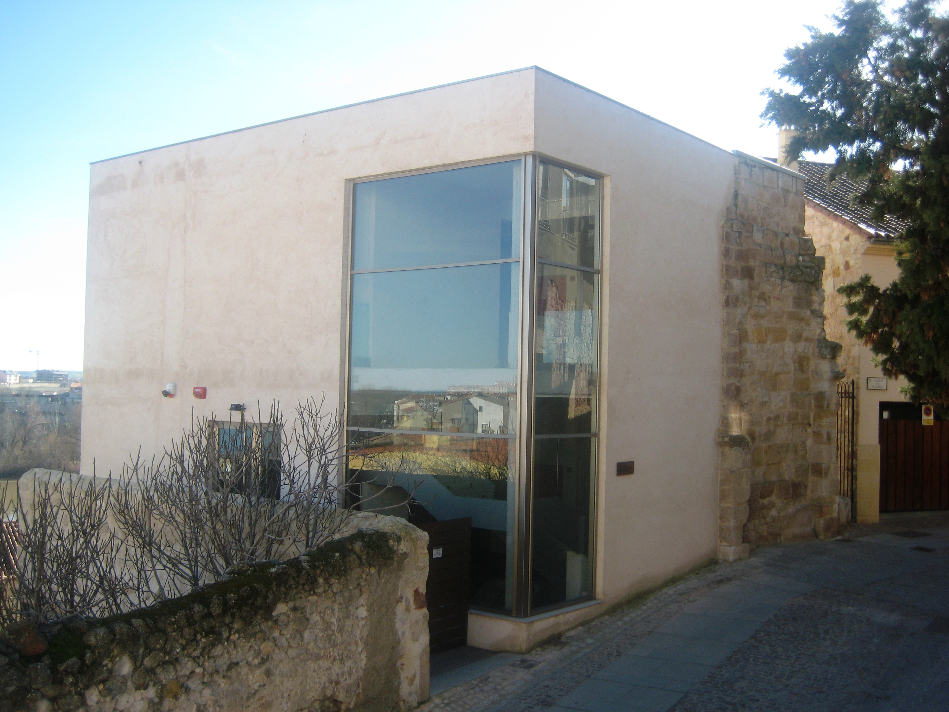 Centro de Interpretación de la Ciudad Medieval (Zamora).